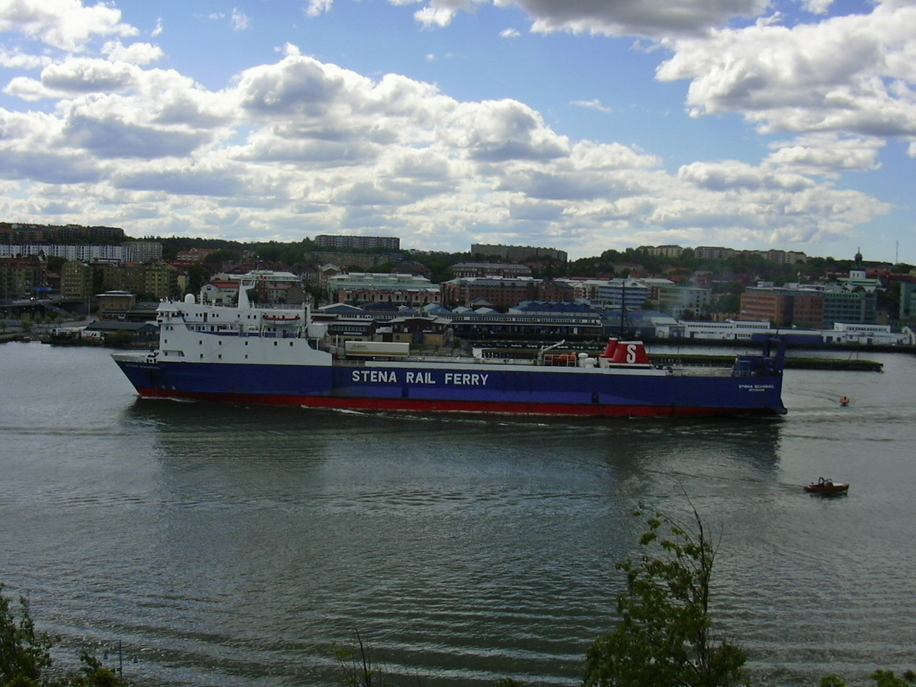 Stena Scanrail på väg till Frihamnen i Göteborg